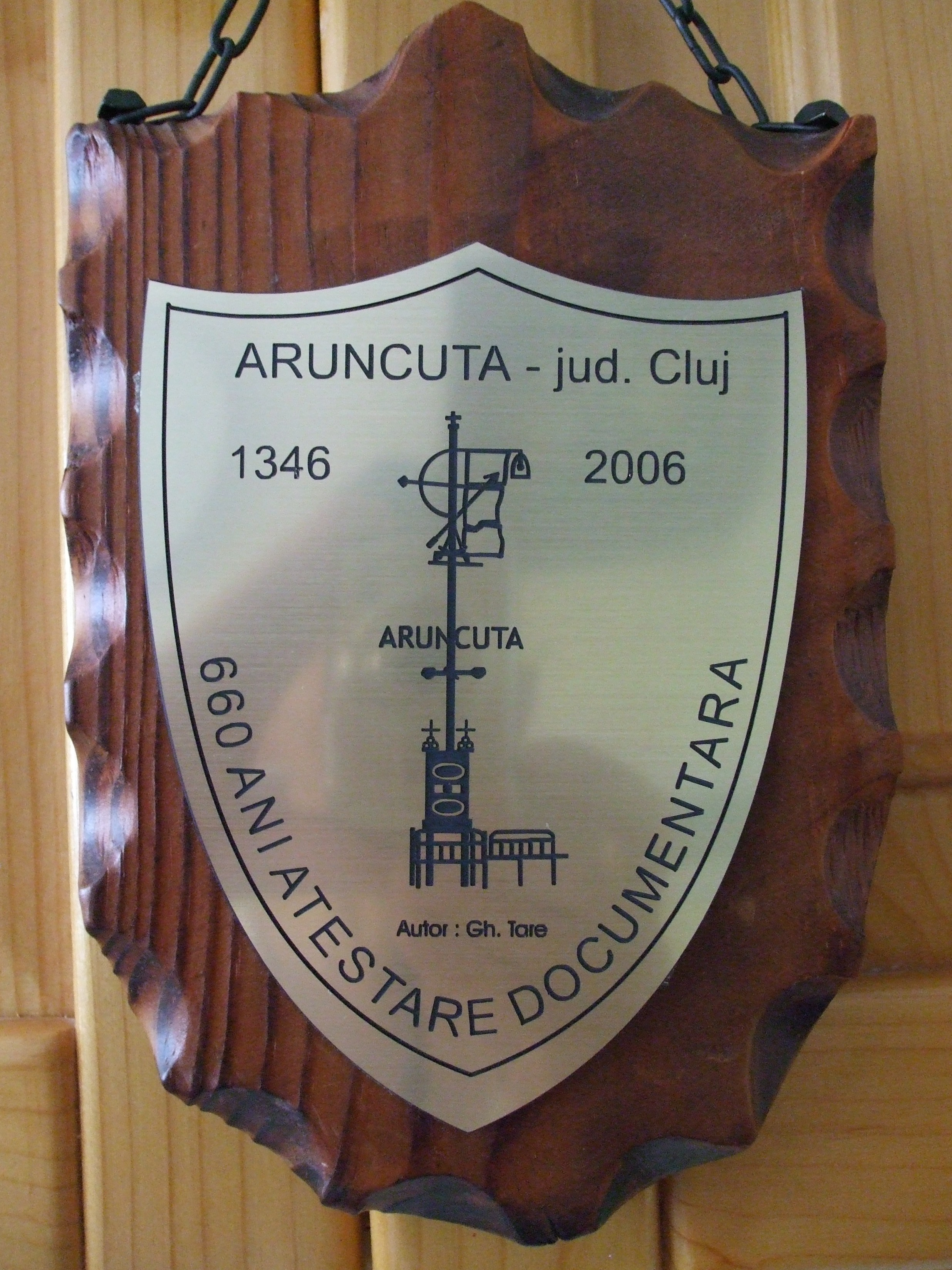 placheta Aruncuta ,Cluj-660 ani de atestare documentara